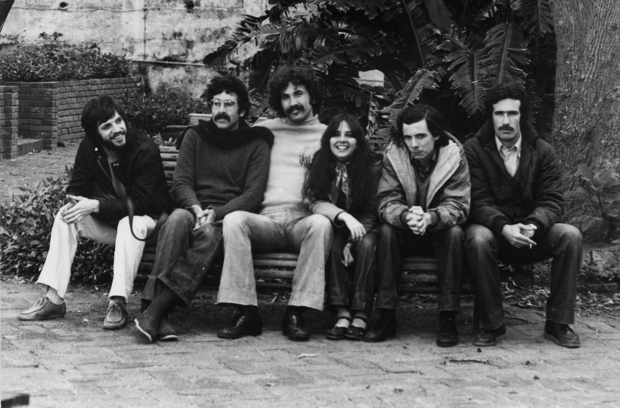 Fotografía del grupo uruguayo de música popular "Rumbo" (1979 - 1987)